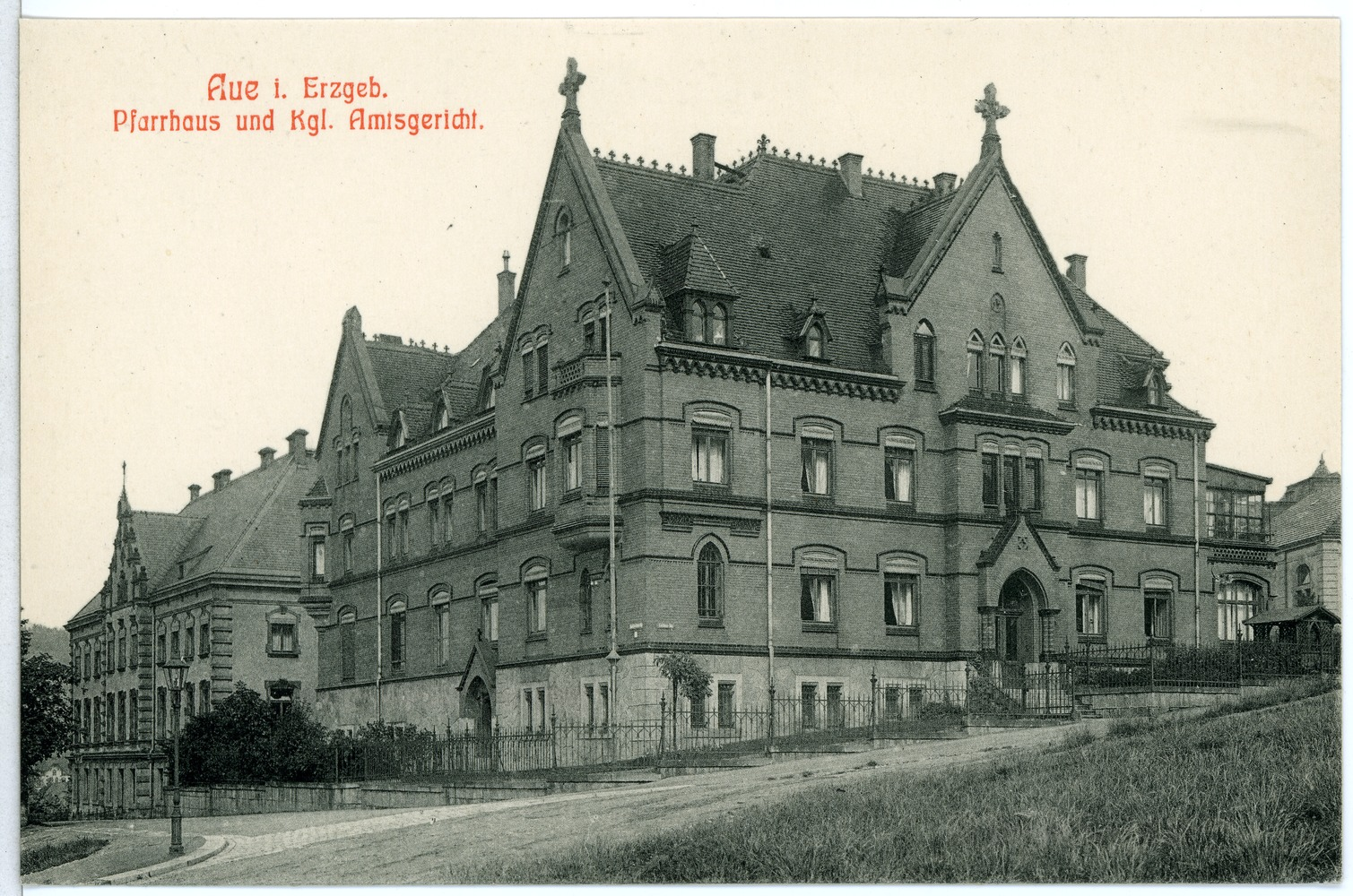 Aue; Pfarrhaus und Königliches Amtsgericht This postcard is from publisher Brück & Sohn in Meißen ( postcard has a unique number 10782 and is available in a higher resolution at the publisher. This images was uploaded in a cooperation project between Wikipedians and the publisher.